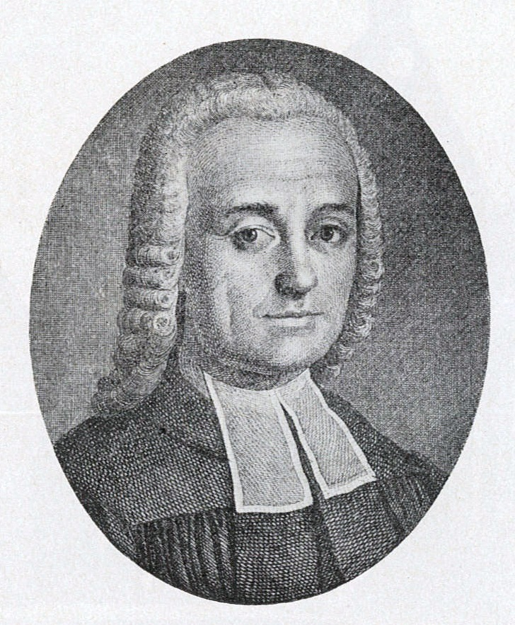 Theologe, Dichter, Bergbaukundiger